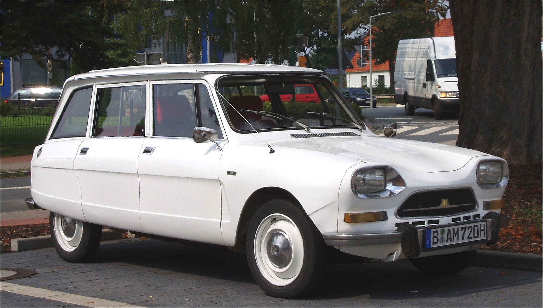 Citroen Ami Super Break